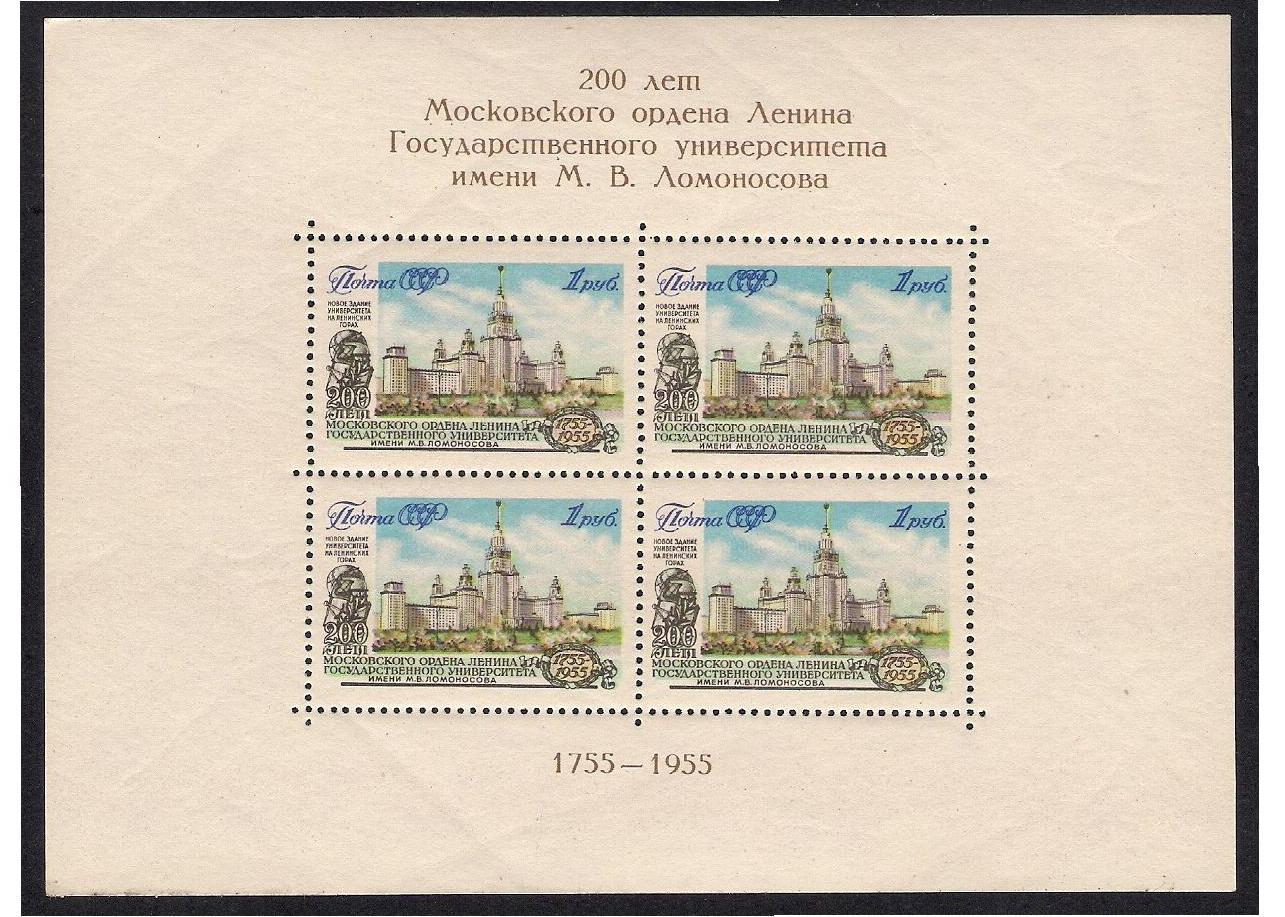 Почтовый блок из четырех марок №1838 1955 г.